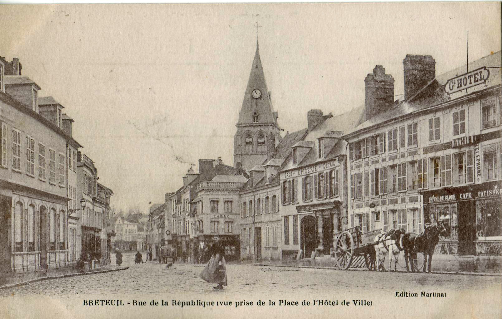 Carte postale ancienne éditée par Martinat : BRETEUIL - Rue de la République (vue prise de la Place de l'Hôtel de Ville)